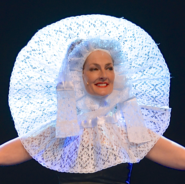 Charlotte Engelkes på Gustav Adolfs torg under Stockholms Kulturfestival 2013.